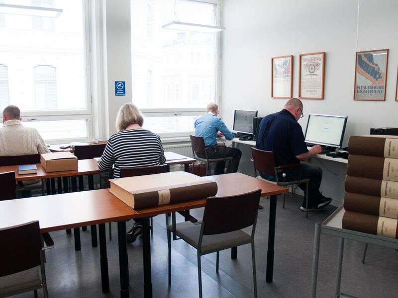 Päivälehden arkiston tutkijasali